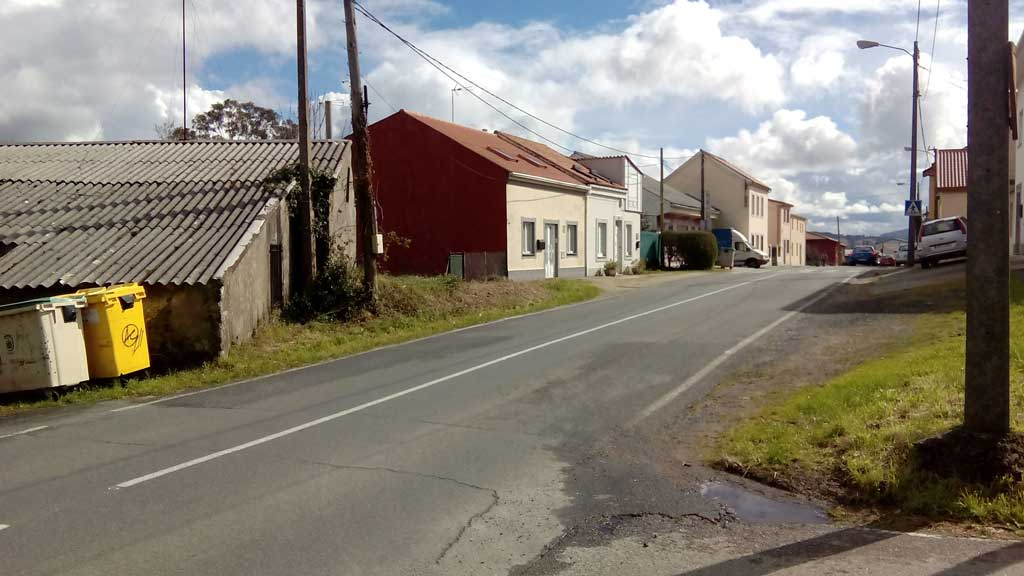 Vista de Beleicón, Santa Icía, Ferrol.